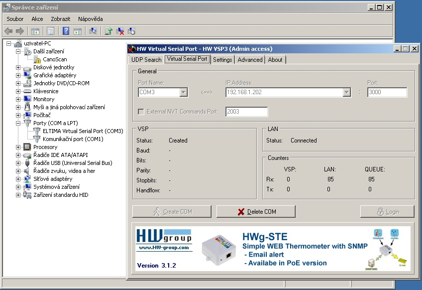 Virtual Serial Port nastavení